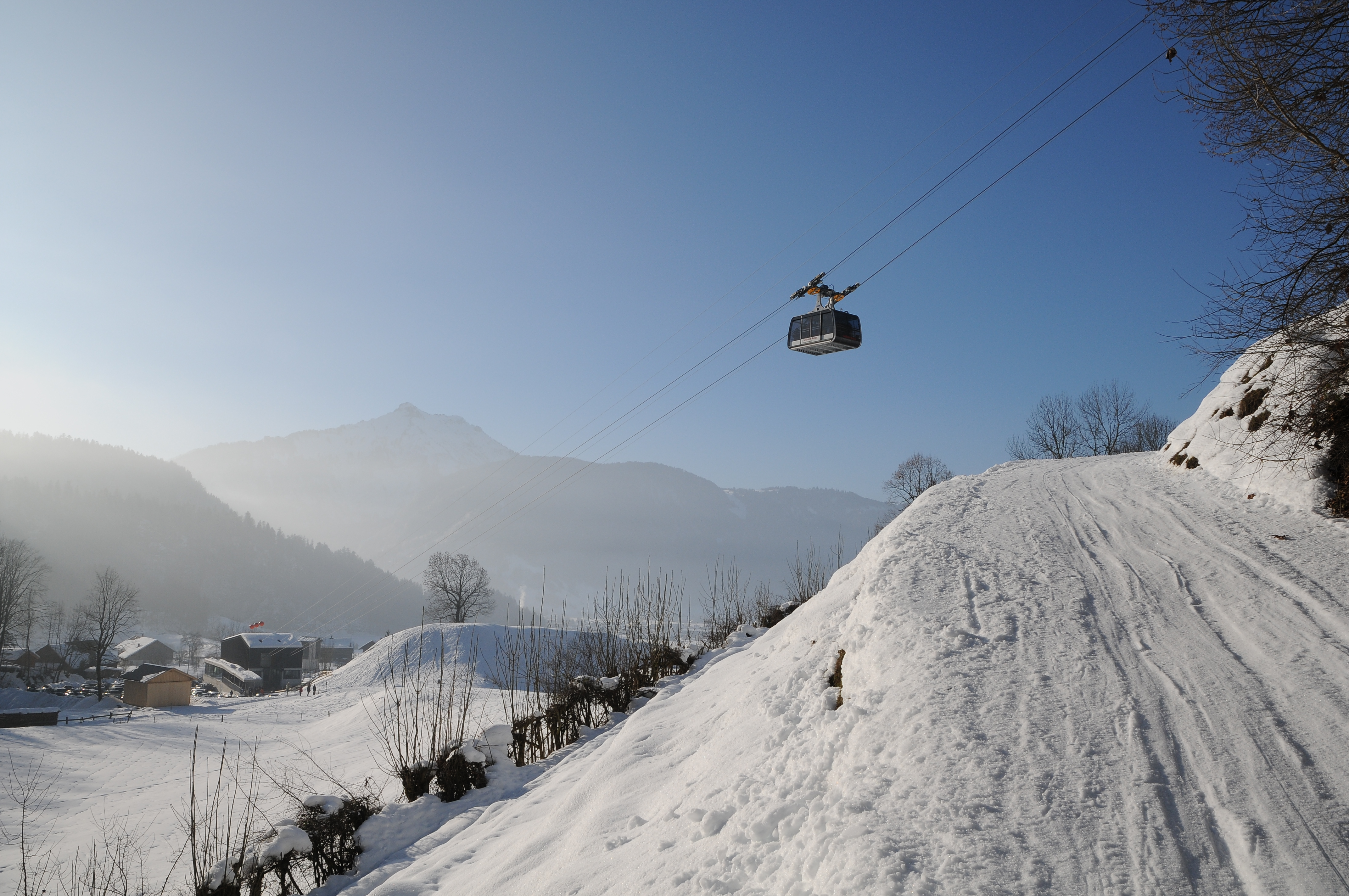 Bergbahnen Bezau , zum "Sonderdach" und zur "Baumgartenhöhe"